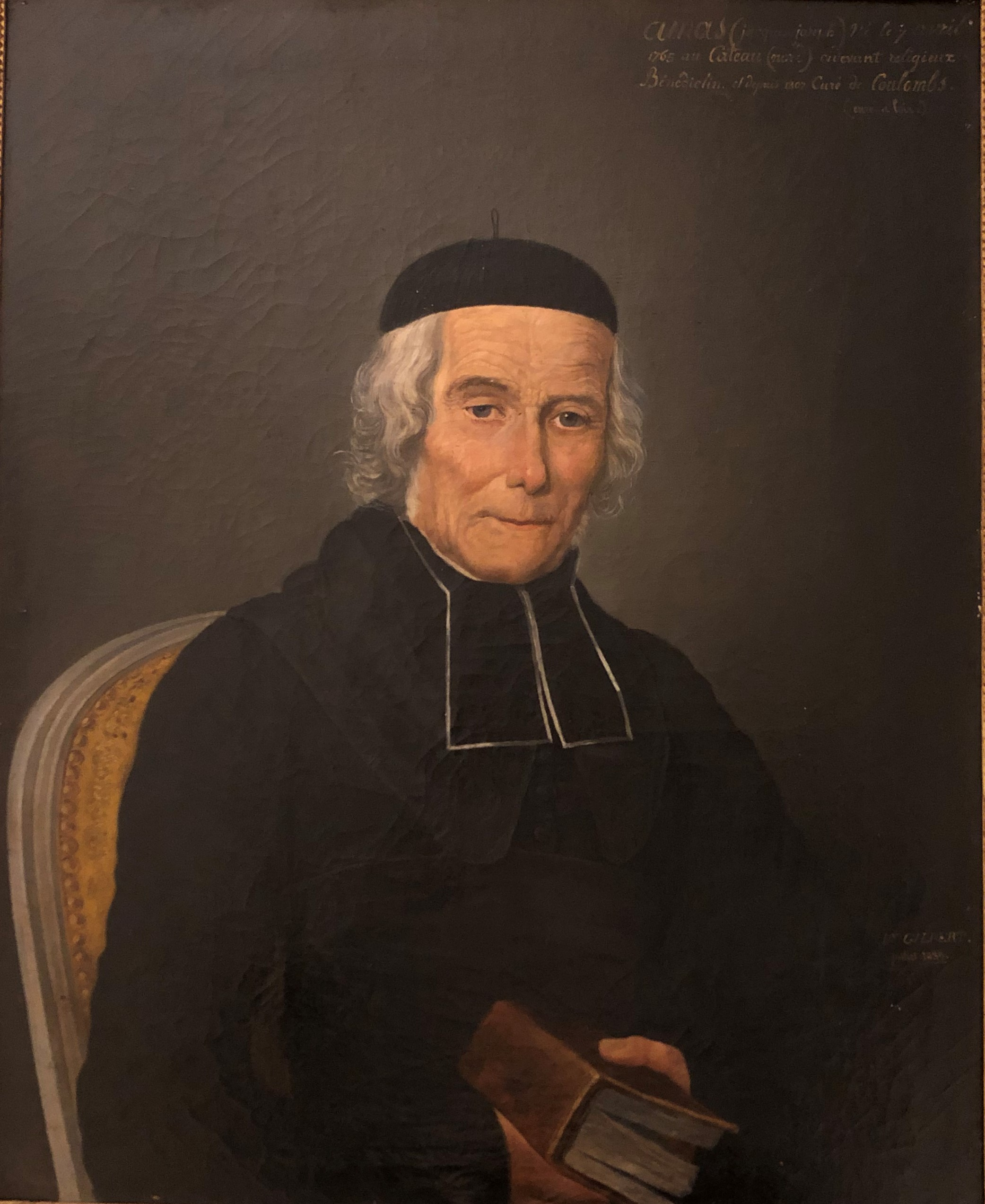 Portrait de l'abbé Jacques-Joseph AMAS curé de COULOMBS par Pierre GILBERT (1839)